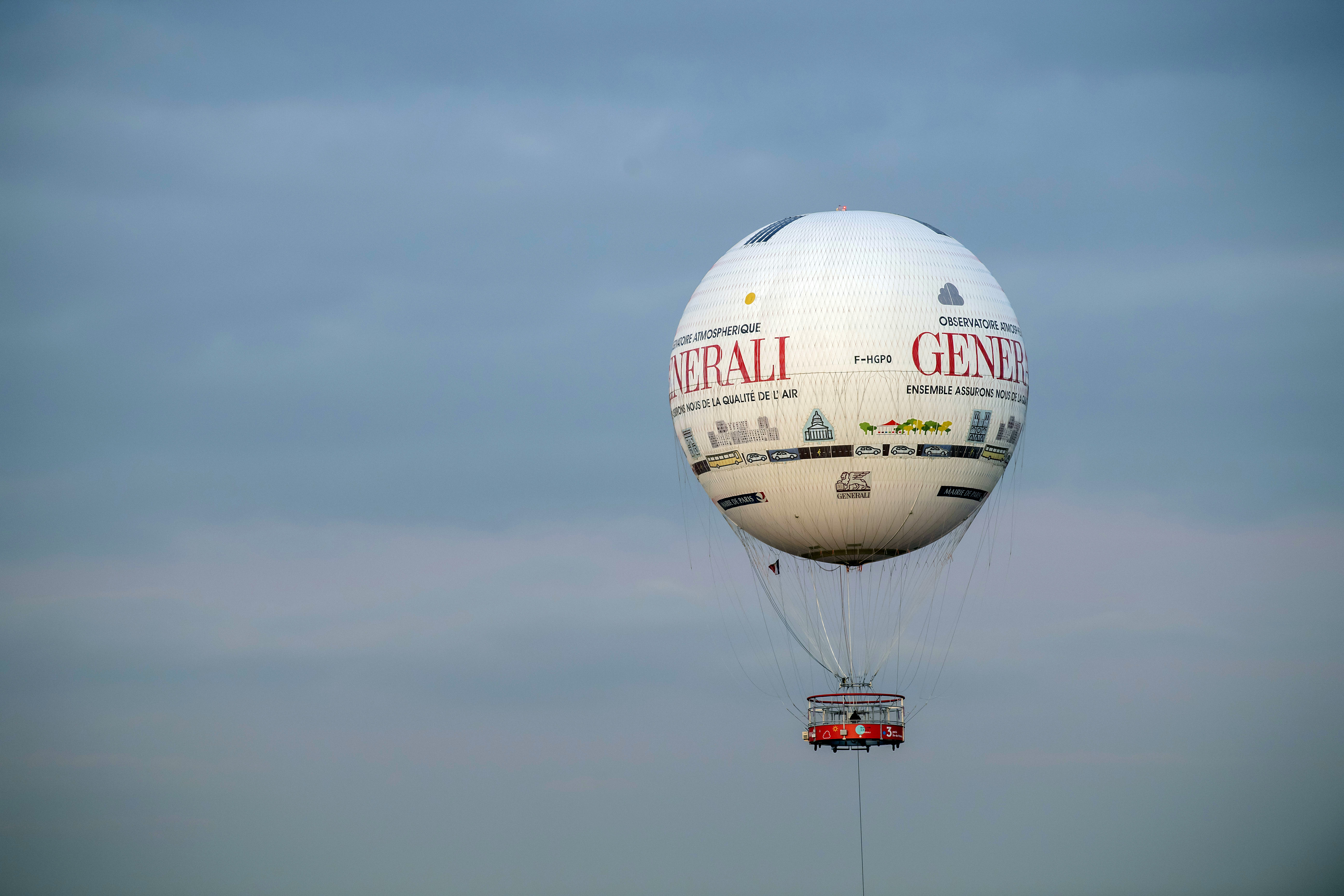 Le Ballon de Paris flotte dans les airs.